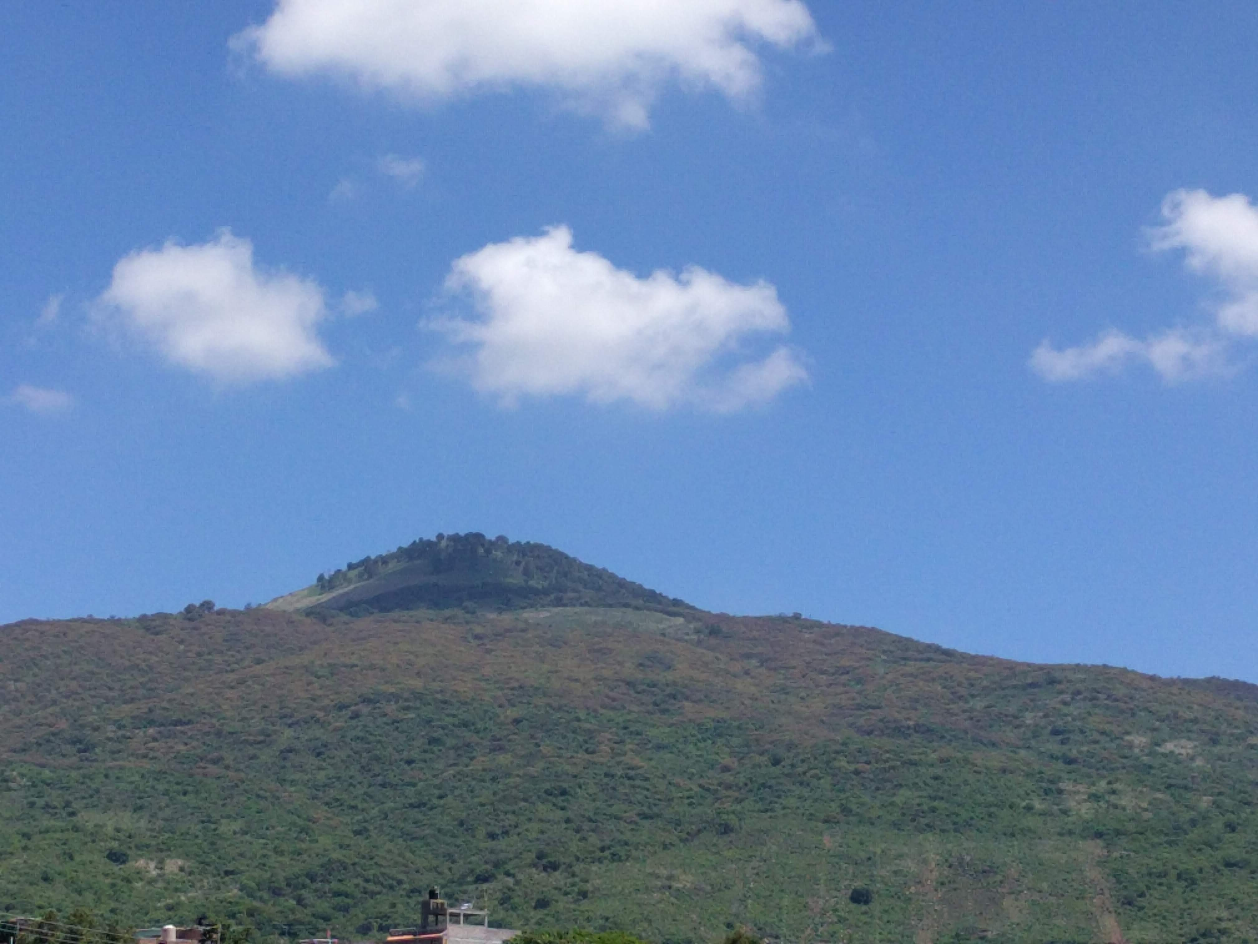 Cerro del Quinceo